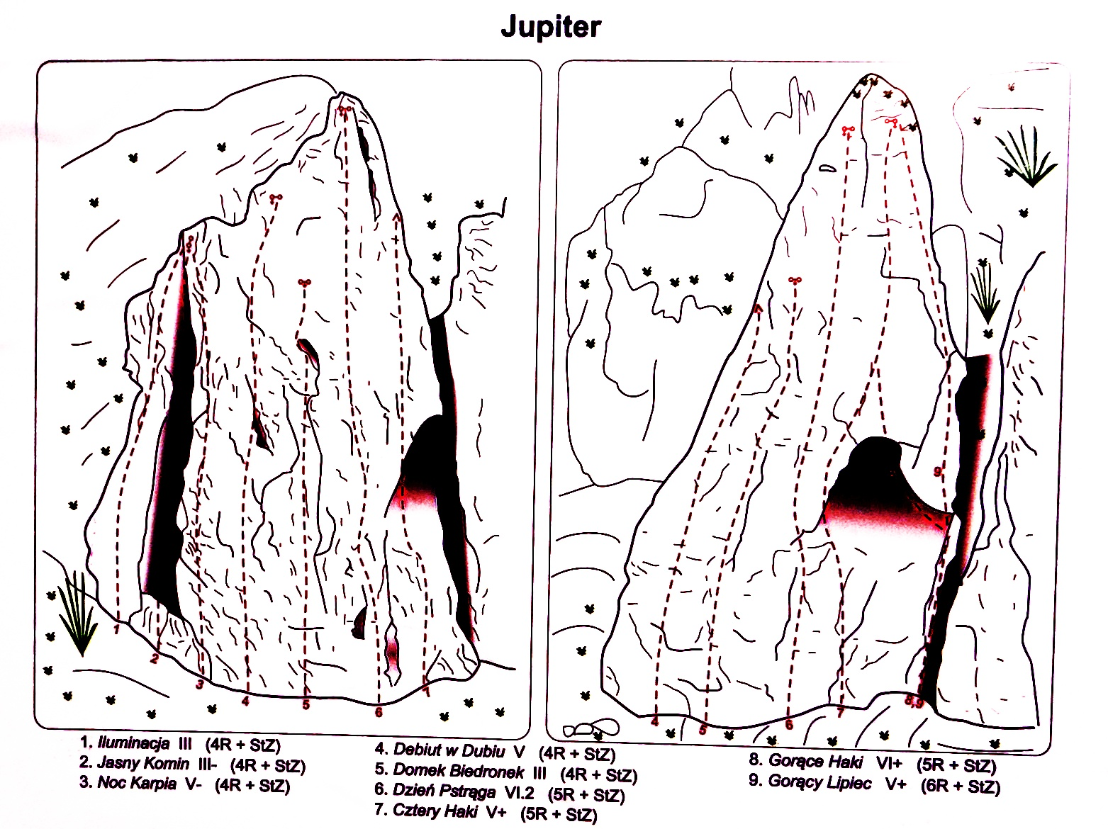 Skałoplan skały Jupiter w Dubiu (na podstawie tablicy zamontowanej przy skale)